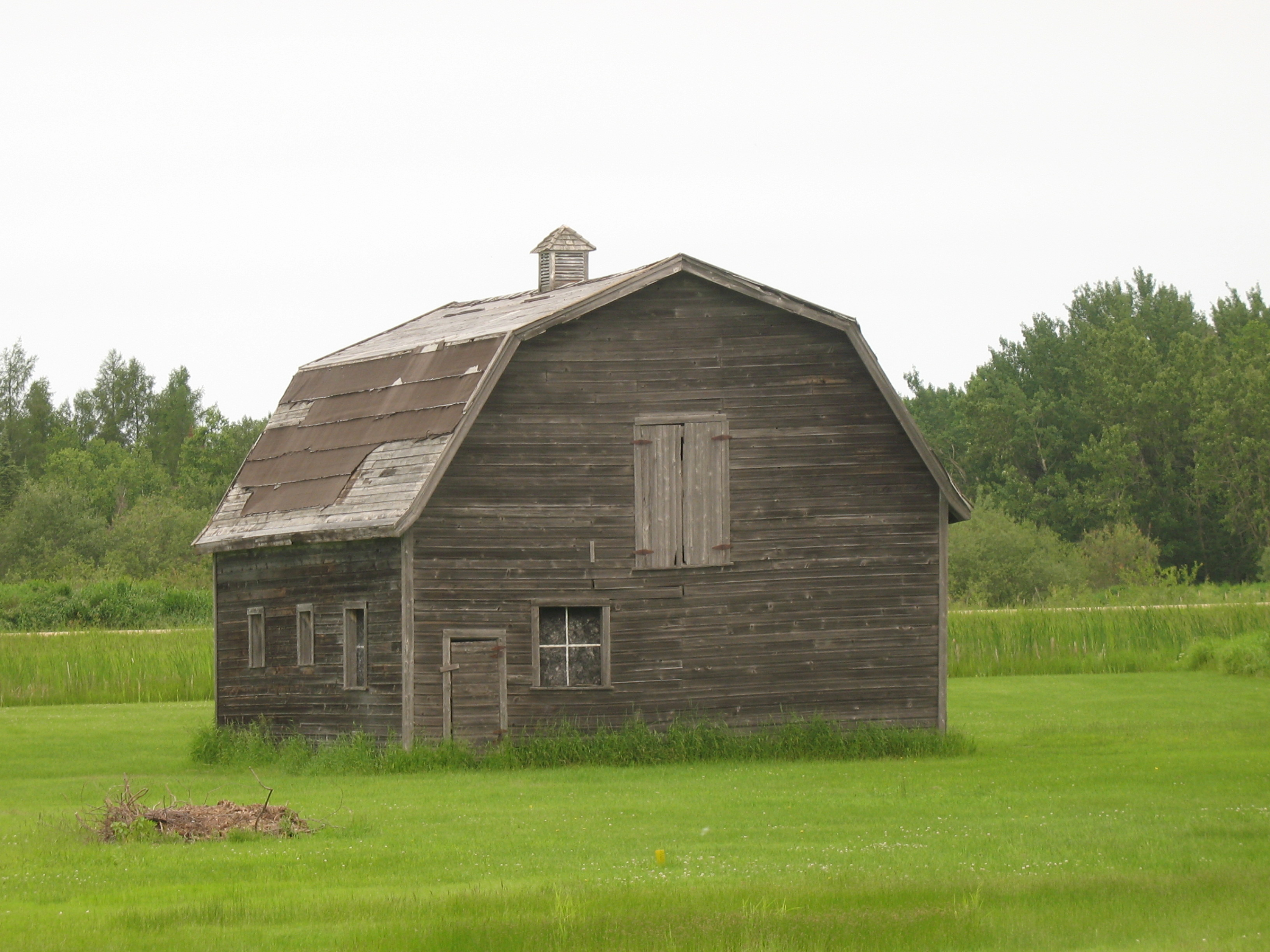 Einfacheres Haus in Hecla Village auf Hecla Island in Manitoba, Kanada